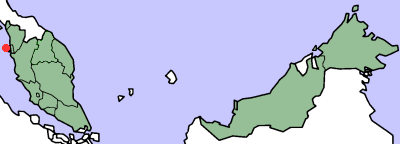 Peta Georgetown di Malaysia